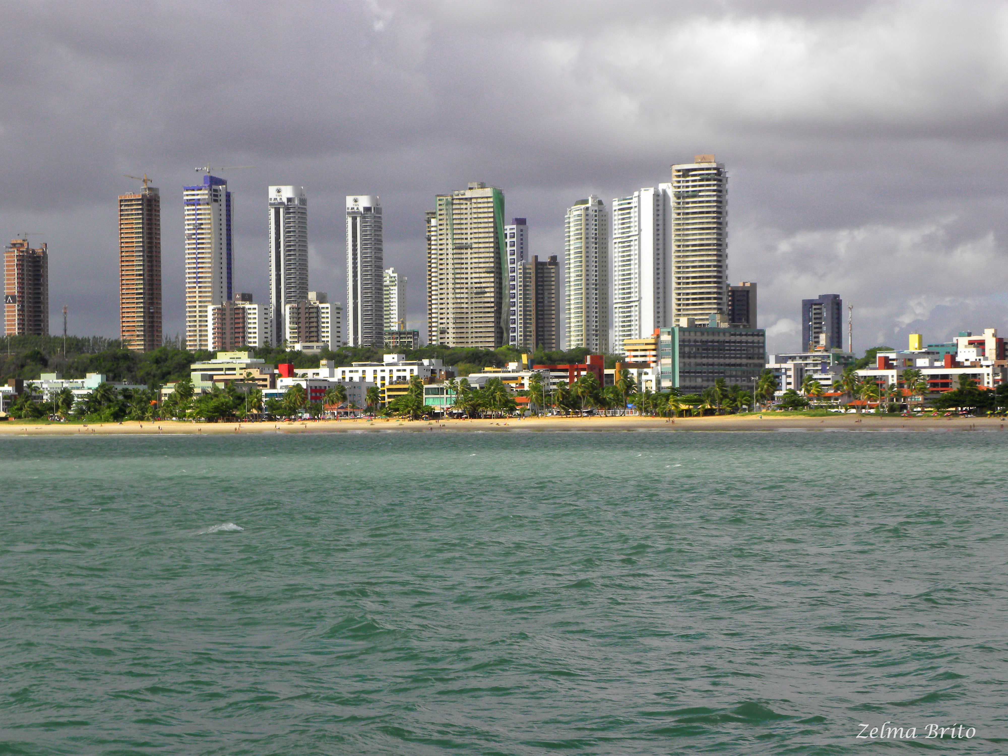 Praia do Cabo Branco - João Pessoa - PB